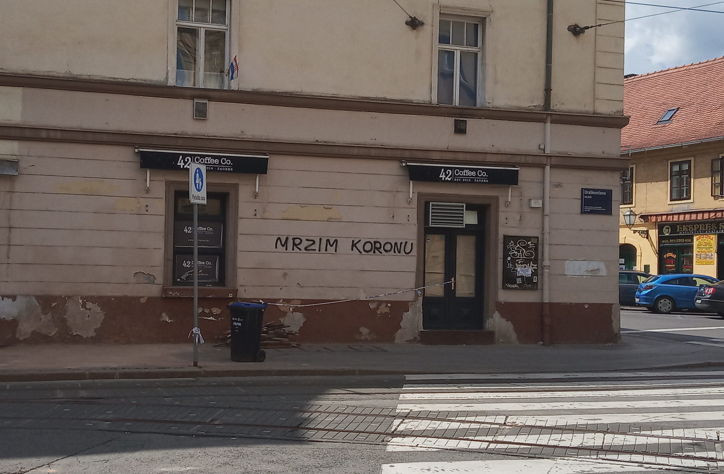 Grafit "Mrzim koronu" na raskrižju Draškovićeve i Vlaške ulice u Zagrebu, Hrvatska